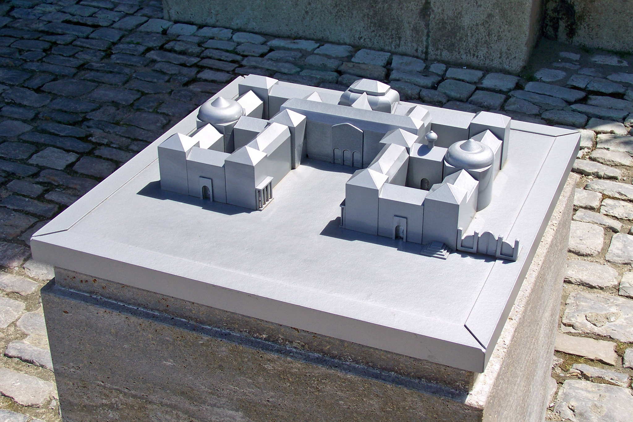 Modell der Würzburger Residenz vor dem realen Gebäude